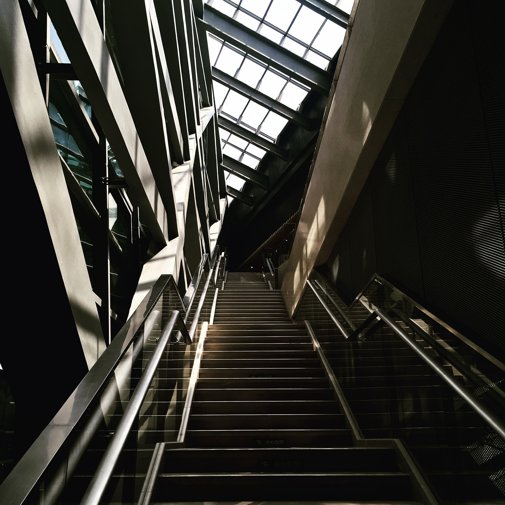 iPhone SE 拍摄